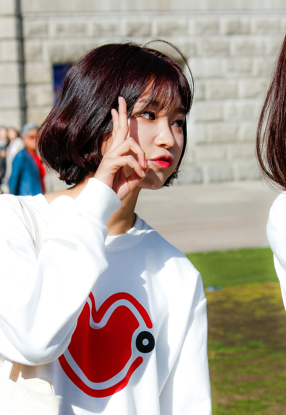 161009 모모랜드 혜빈 서울시청 한글 세계 대회 개회식